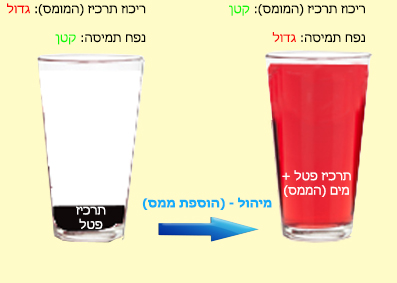 הסבר תהליך של מיהול